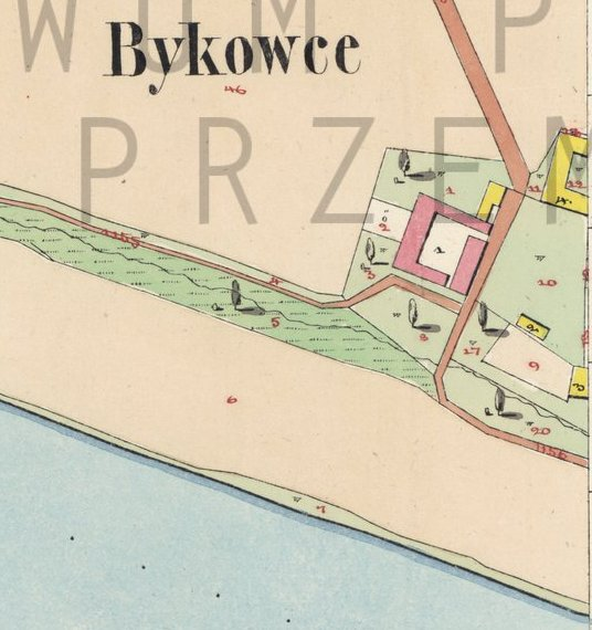 Mapa dworu w Bykowcach.